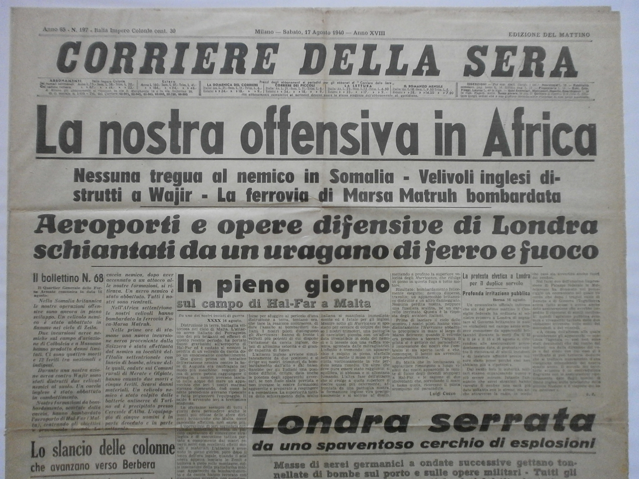 Corriere Della Sera - 17 agosto 1940 - Offensiva in Africa - titolo